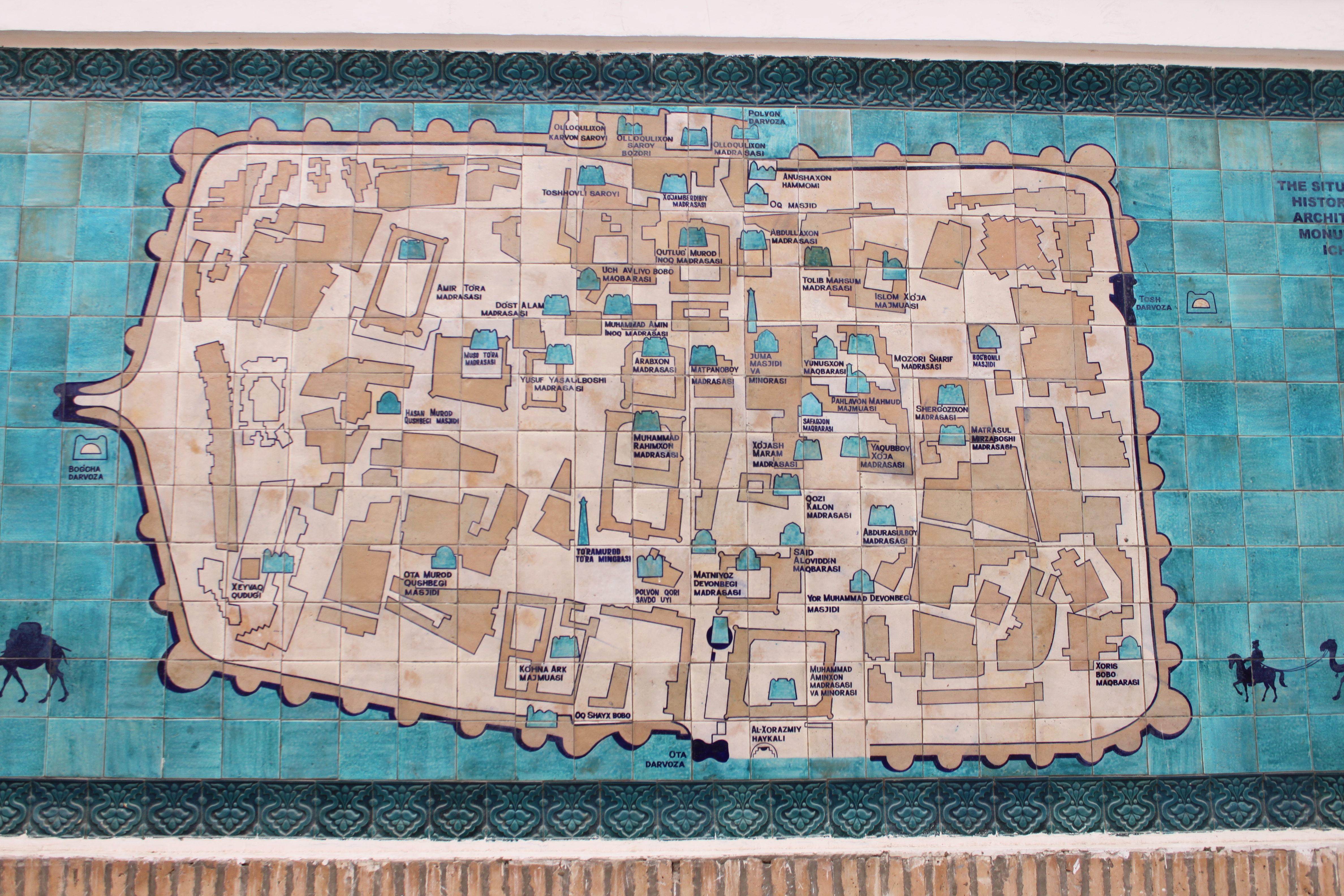 Схема историко-архитектурных памятников Ичан-Калы. Мозаика у ворот Ата-дарваза